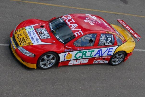 Chevrolet Vectra de TR Junior, campeón 2009. Piloto: Germán Giles